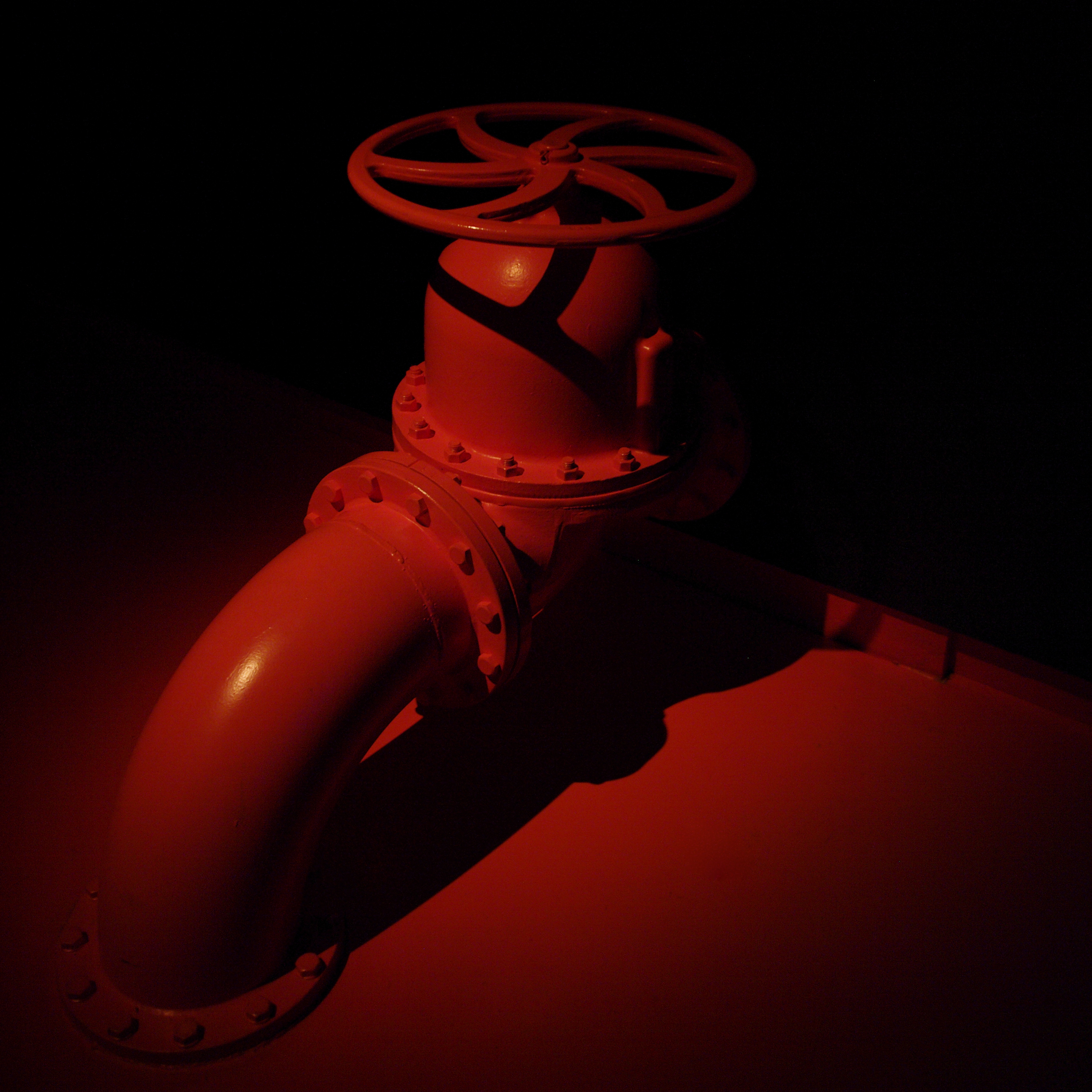 Valve